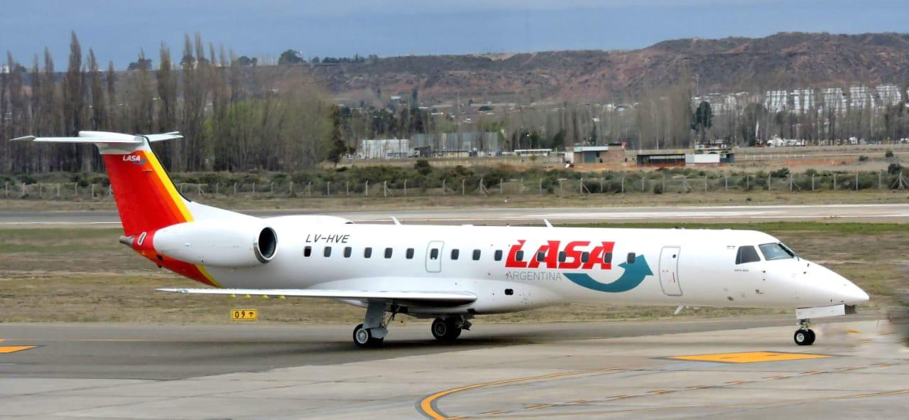 Avión de Aerolíneas Lasa en Pista del Aeropuerto Internacional de Neuquén